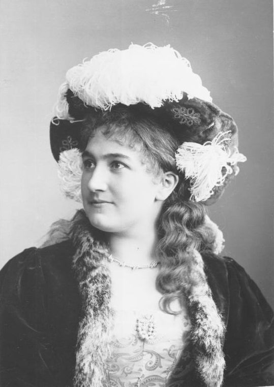 Charlotte Boch (1865–1931), deutsche Theaterschauspielerin